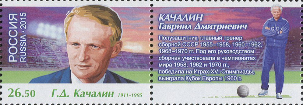 Чемпионат мира по футболу FIFA 2018 в России. Легенды футбола.Г.Д. Качалин (1911-1995)